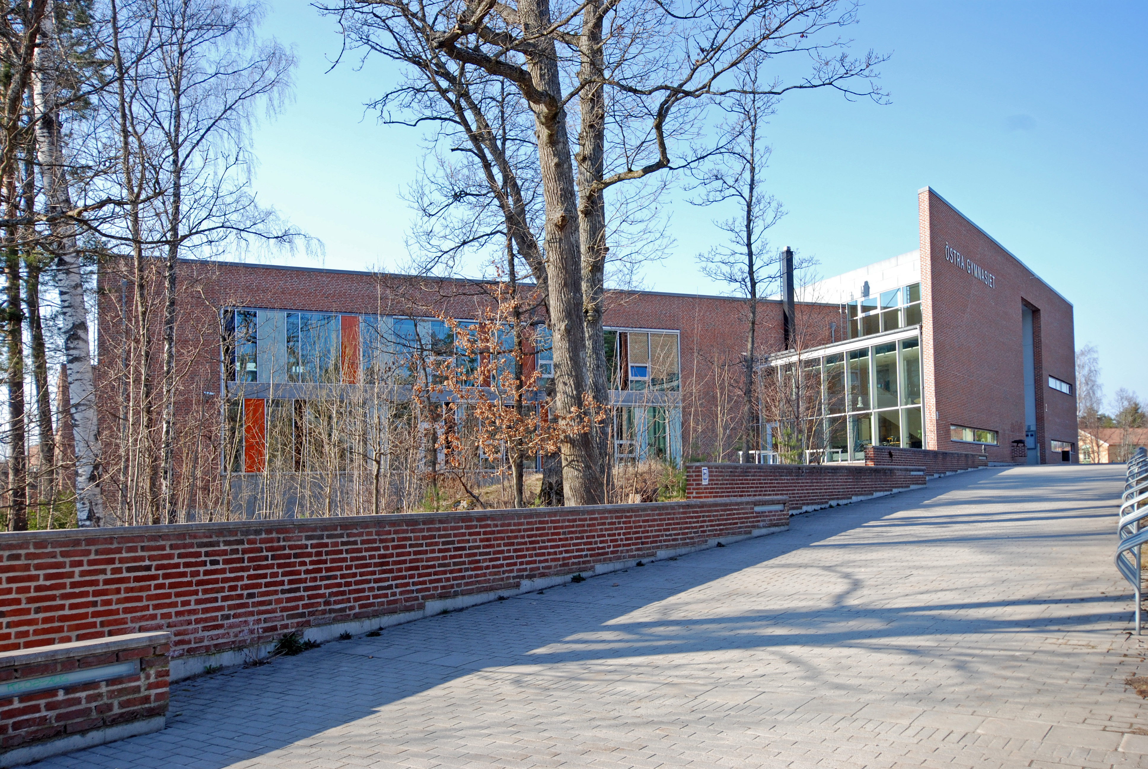 Östra Gymnasiet i Huddinge kommun. Byggnadsår 2005. Arkitekter: Arkitektkontoret Fråne Hederus Malmström